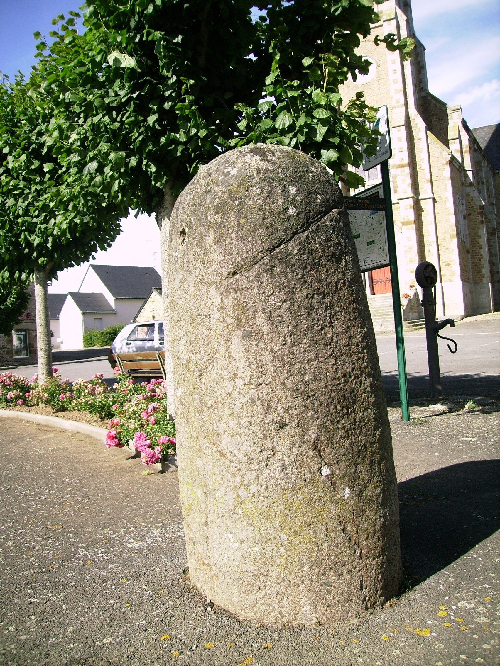 Stèle de Desertines, Mayenne